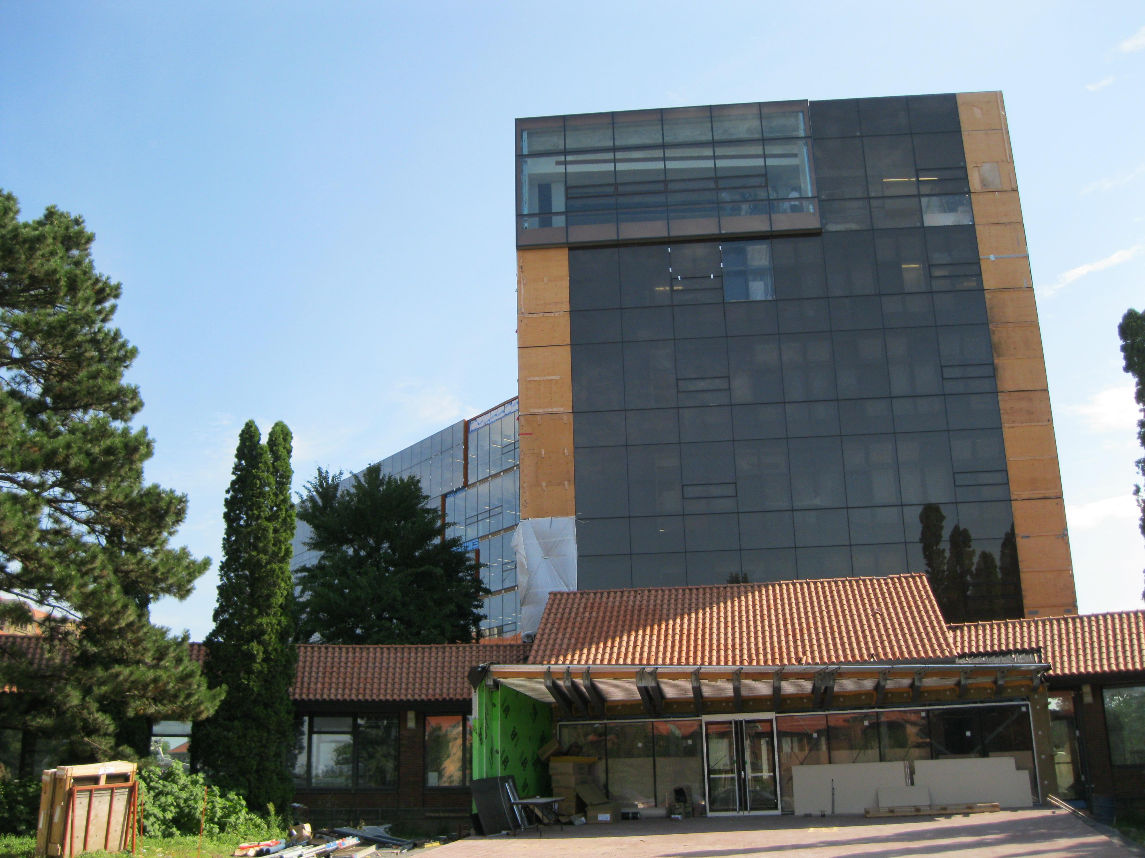 John Abbott College